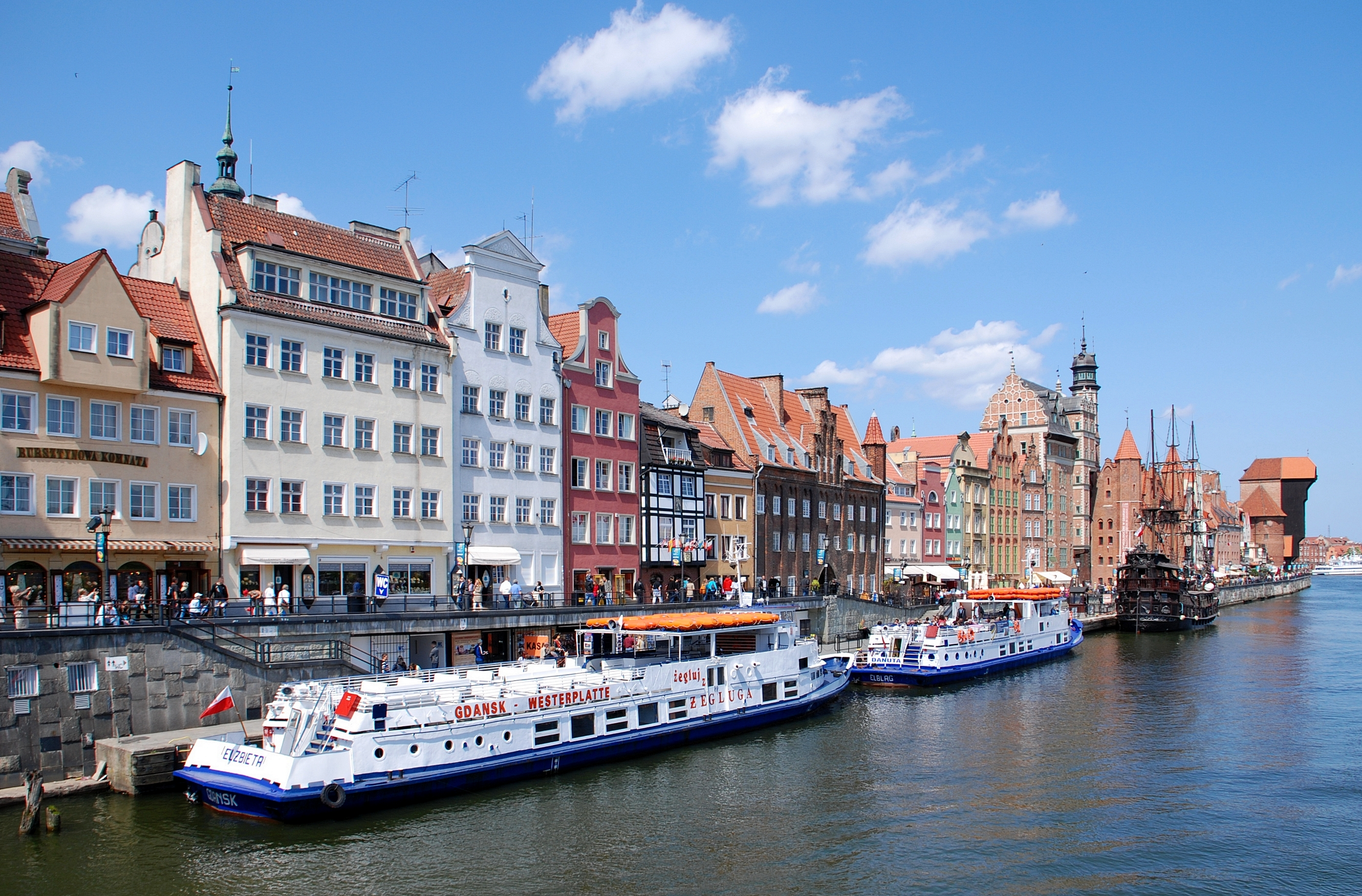 miasto Gdańsk